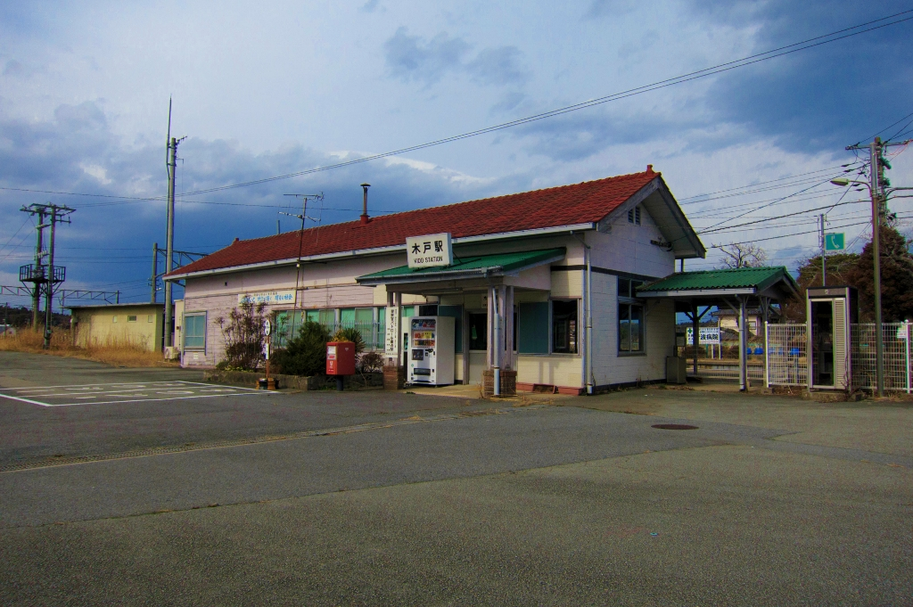 東日本旅客鉄道株式会社常磐線木戸駅（東北地方太平洋沖地震後、警戒区域一時帰宅時に撮影）